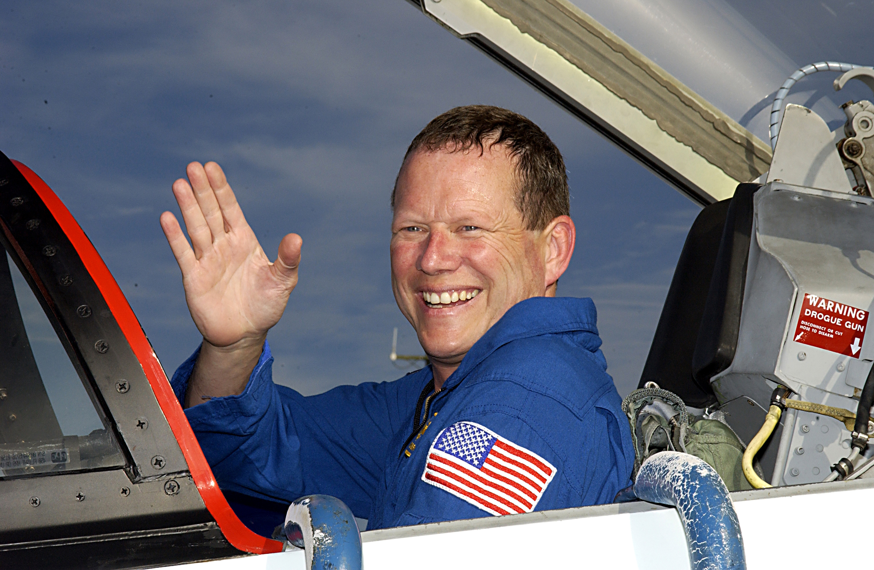 Brown entrenando para la NASA KENNEDY SPACE CENTER, FLA. -- STS-107 Mission Specialist David Brown arrives at KSC to take part in Terminal Countdown Demonstration Test activities, which include a simulated launch countdown. Other crew members are Commander Rick Husband, Pilot William "Willie" McCool, Payload Commander Michael Anderson, Mission Specialists Kalpana Chawla and Laurel Clark and Payload Specialist Ilan Ramon (the first Israeli astronaut). STS-107 is a mission devoted to research and will include more than 80 experiments that will study Earth and space science, advanced technology development, and astronaut health and safety. Launch is scheduled for Jan. 16, 2003.